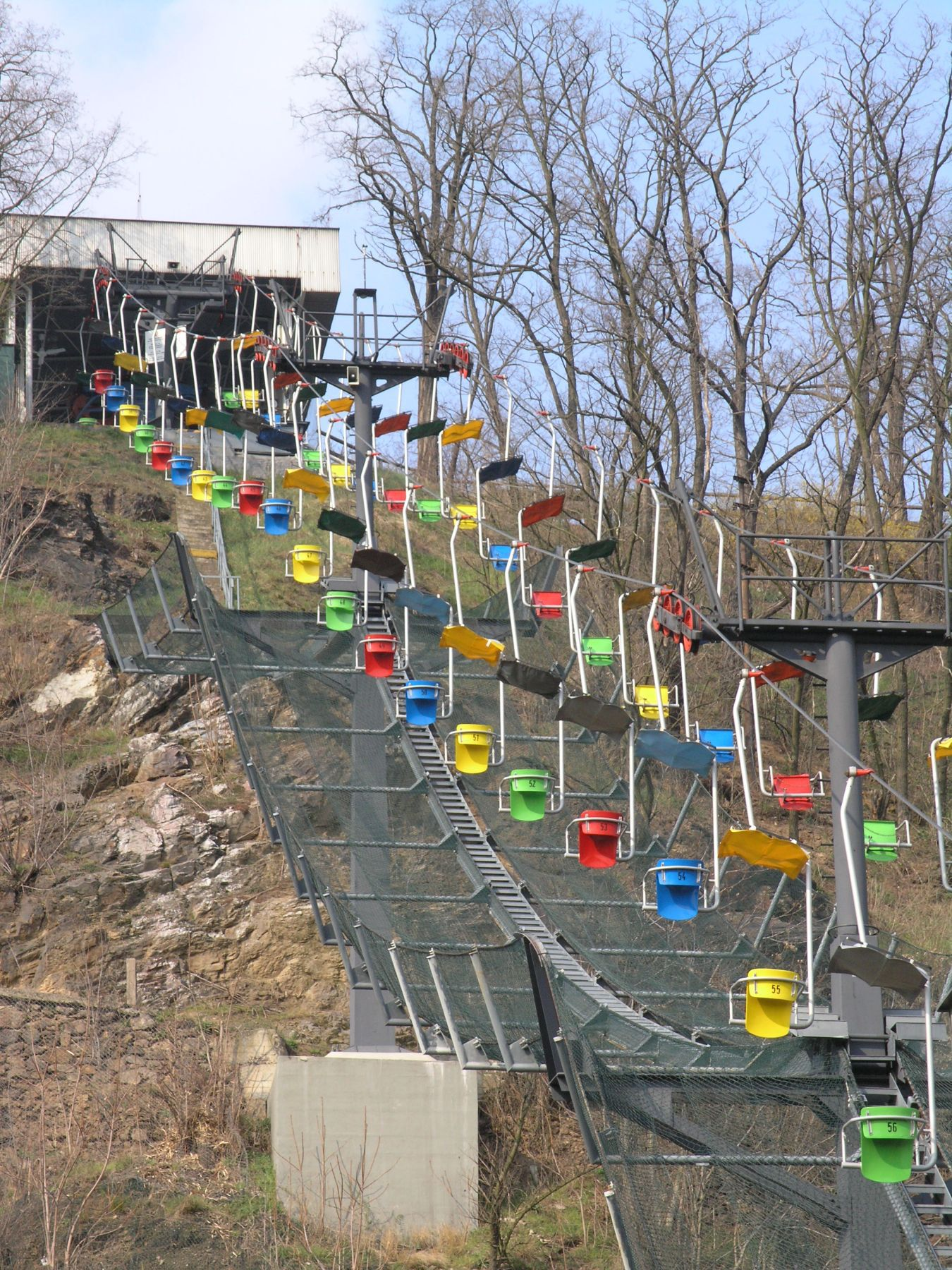 Mellivora capensis (Prague ZOO)